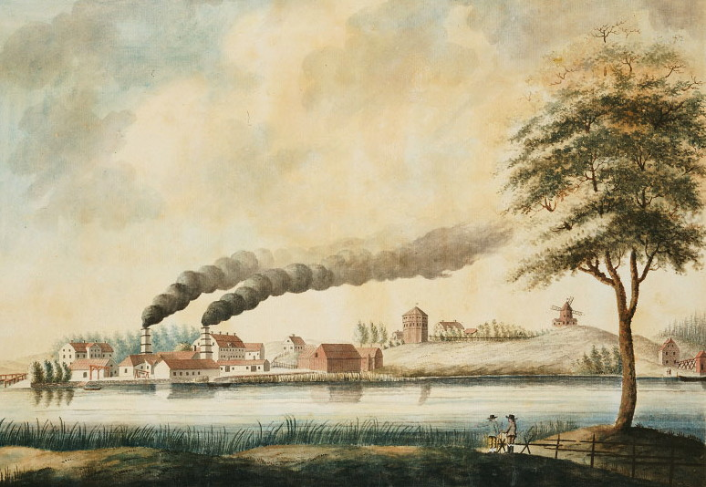 "Utsigt af Bergsund 1796" med Hornstullskvarnen Konstnär: Meijer, J. G. Material och teknik: Akvarell Underlag: Papper Mått i mm: 460X600